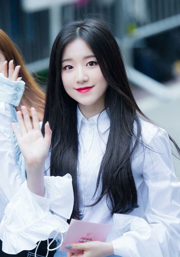 Shuhua a caminho do Music Bank em 11 de maio de 2018